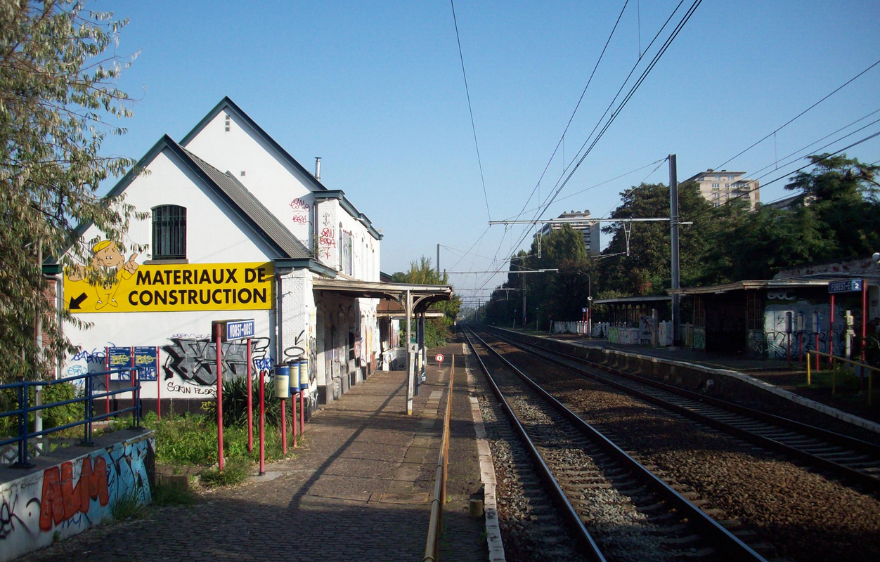 Station Vorst-Oost